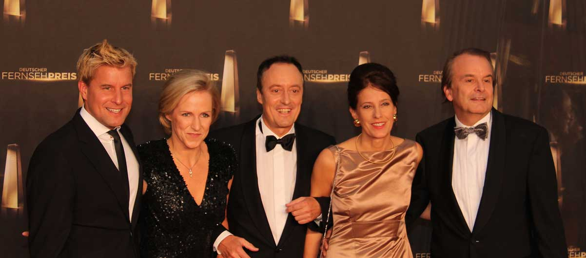 Team der Phoenix-Sendung Der Tag beim Deutschen Fernsehpreis 2012 (v.l.n.r.: Michael Kolz - Simone Fibiger - Michael Krons - Constanze Abratzky und Alfred Schier)